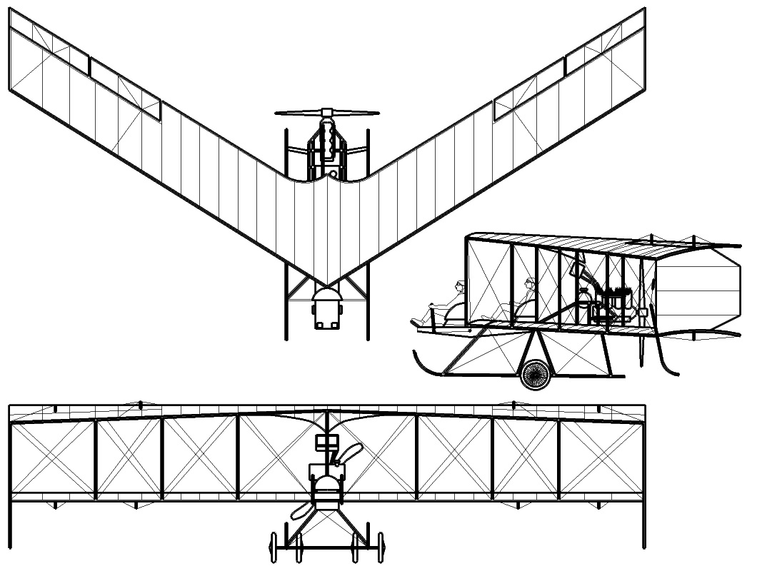 Dunne Tailless Typical